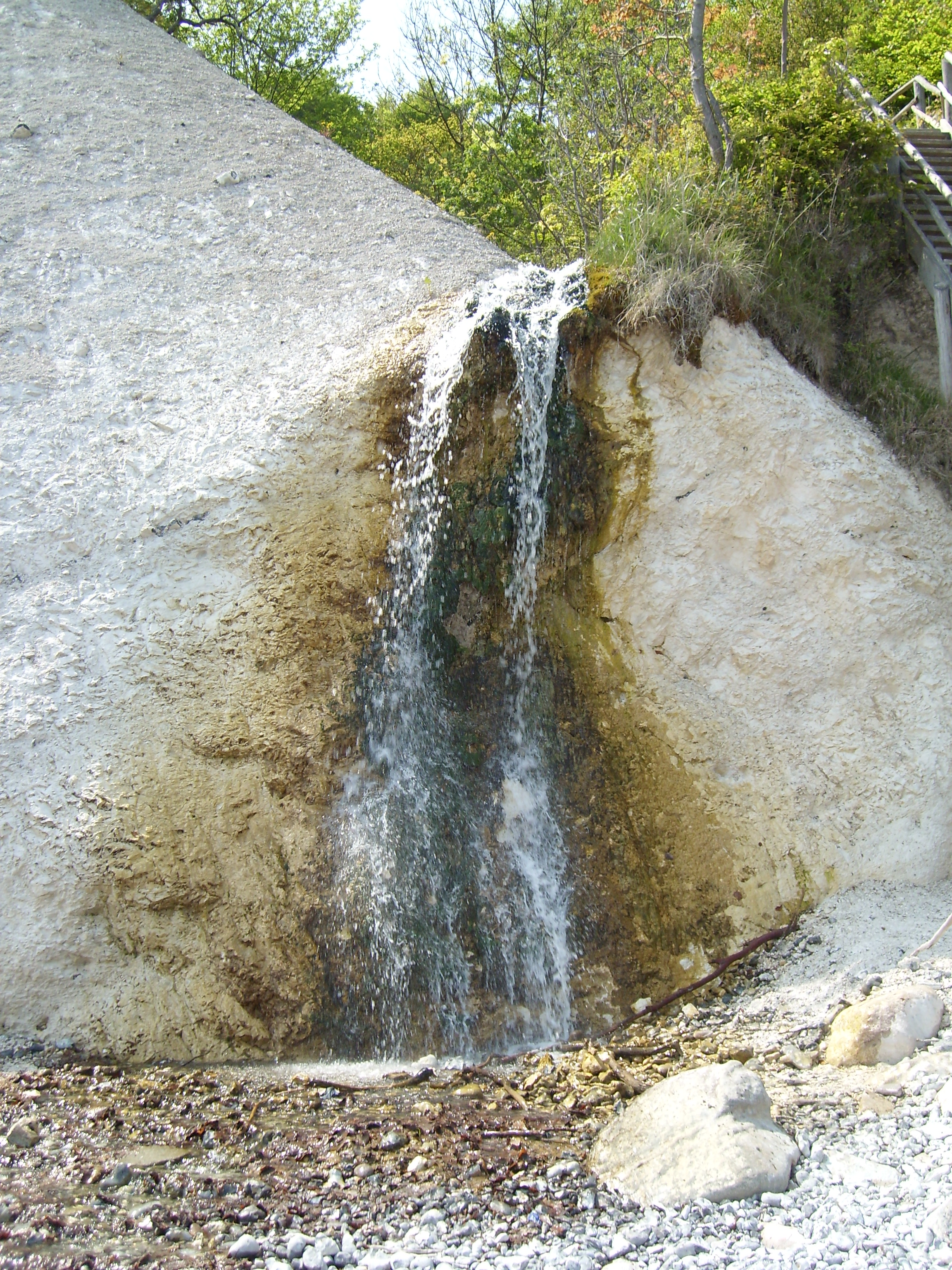 Wasserfall des Kieler Baches am Kieler Ufer im Nationalpark Jasmund, Rügen.